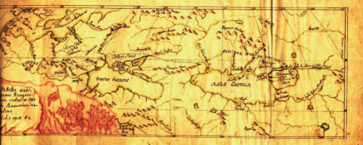 Bod Péter: Tabella antiquam Hungarorum sedem et iter in Panonniam exhibens, in: Historia Hungarorum ecclesiastica, Nagyenyed, 1765, Bethlen Gábor Könyvtár, ms. 187, 12-13. o.